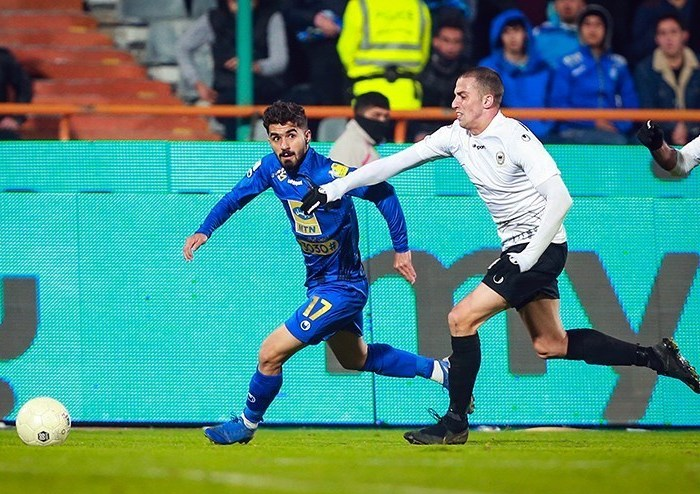 تیم فوتبال استقلال در دیدار هفته پانزدهم رقابت‌های لیگ برتر از ساعت ۱۷:۳۰ شنبه، ۲۳ آذر ۱۳۹۸ در ورزشگاه آزادی میزبان شاهین شهرداری بوشهر بود و با نتیجه ۴ بر یک به برتری رسید. گل‌های استقلال را در این بازی آرش رضاوند (۲۹)، مهدی قائدی (۵۲)، محمد دانشگر (۵۸) و شیخ دیاباته (۶۹) به ثمر رساندند و روزبه چشمی (۸۸ - گل به خودی) برای شاهین گلزنی کرد. (مشاهده گزارش بازی)